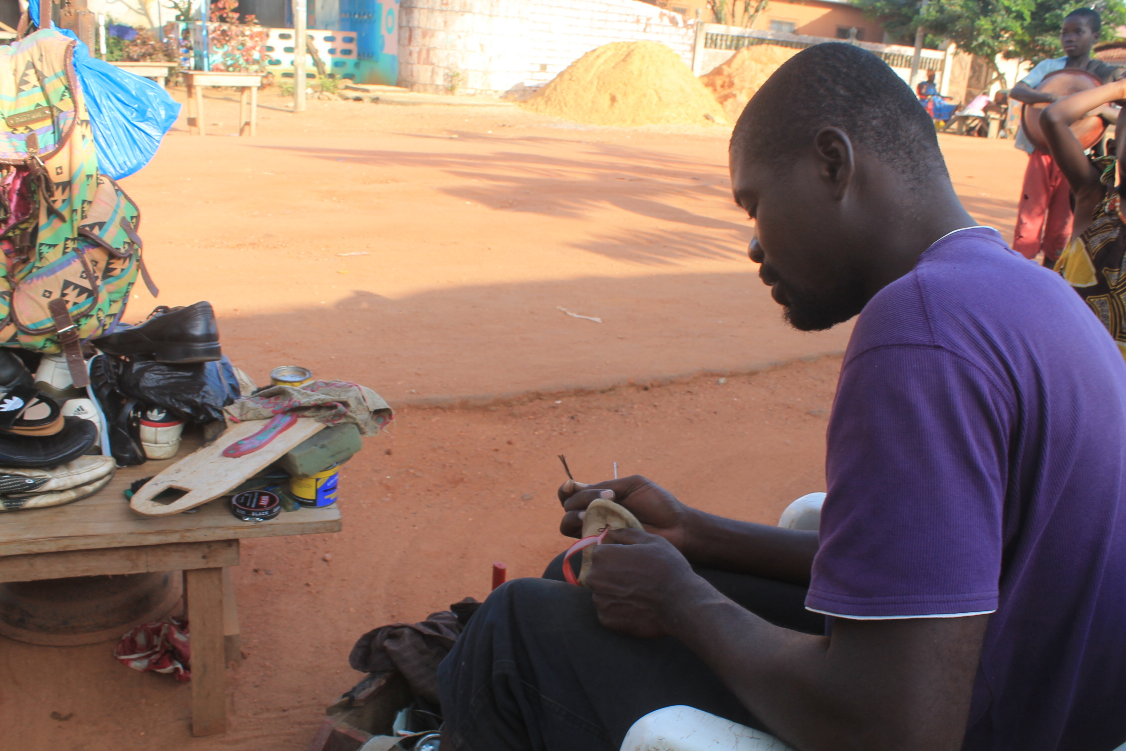 Un cordonnier en pleine journée de travail dans les rues d'Aboisso, une ville située au Sud de la Côte d'Ivoire. La ville est à environ 116 km d'Abidjan, la capitale économique ivoirienne. This is an image of "African people at work" from Ivory Coast